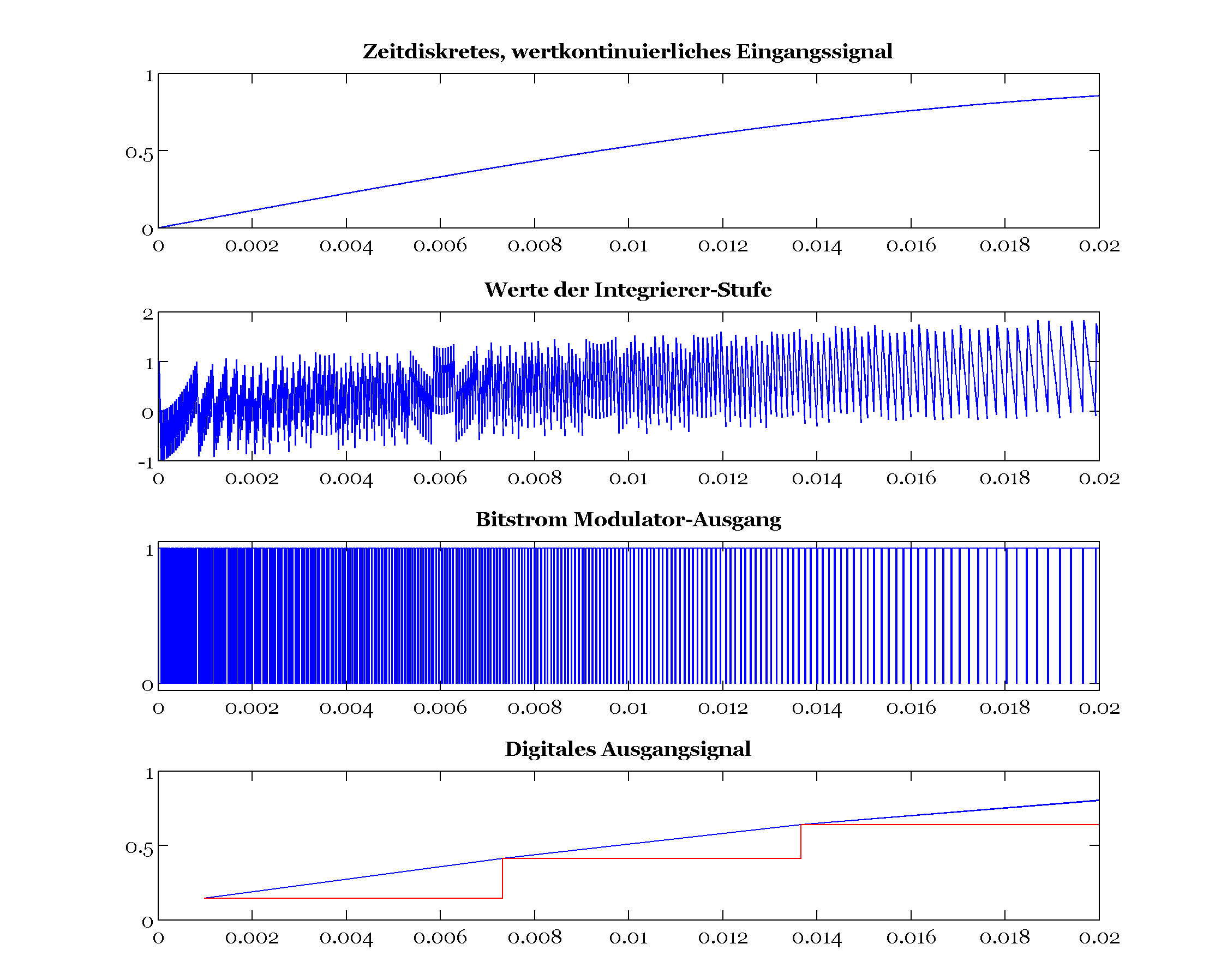 Werte in verschiedenen Stufen des Delta-Sigma-Umsetzers bei sinusförmigem Eingangssignal